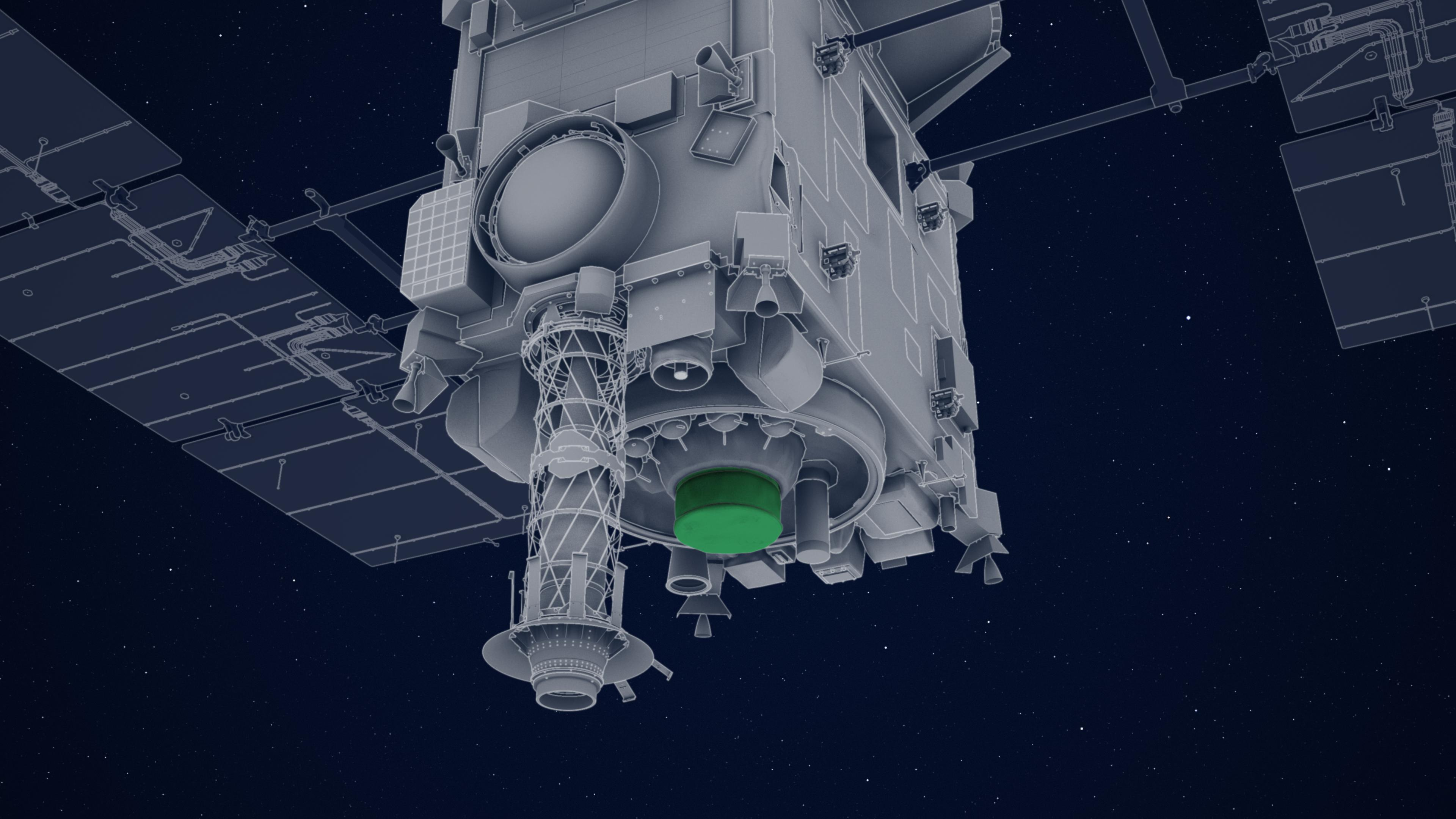 Der SCI ist ein zwei Kilogramm schwerer Kupferkörper, der auf der Oberfläche des Asteroiden einen künstlichen Krater schlägt, wodurch die innere Struktur des Asteroiden vor und nach dem Schlag untersucht werden kann